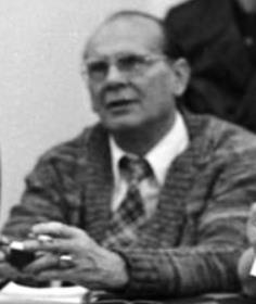 Baross Imre, az Állami Artistaképző Intézet (ma Baross Imre Artistaképző Szakközépiskola és Szakiskola) igazgatója.